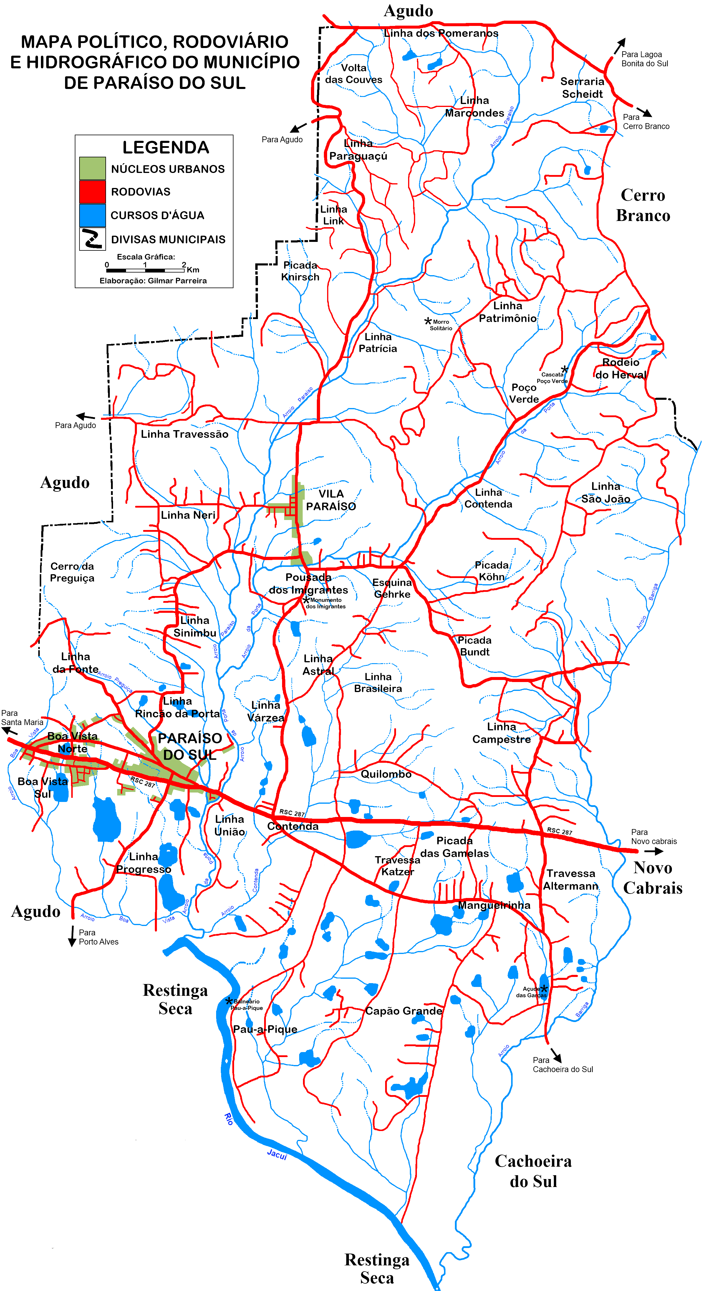 Mapa do Município de Paraíso do Sul.